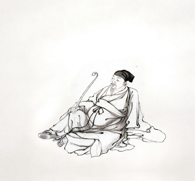 莫是龙，字云卿，如忠子。松江华亭人。万历元年选贡。工古文书画。